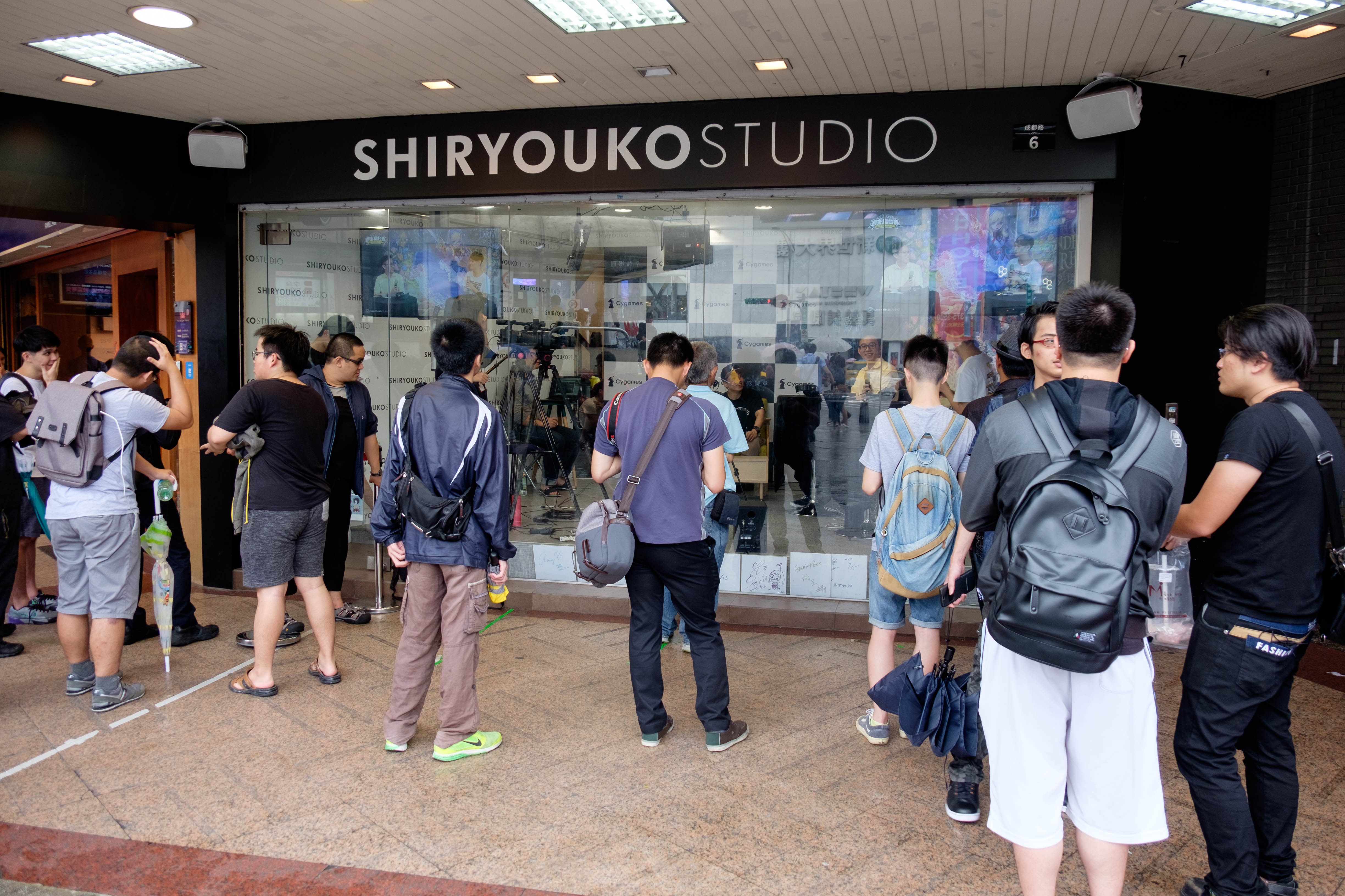 詩涼子街頭實況攝影棚前，觀看《暗影詩章》週末擂台賽賽局實況的觀眾。